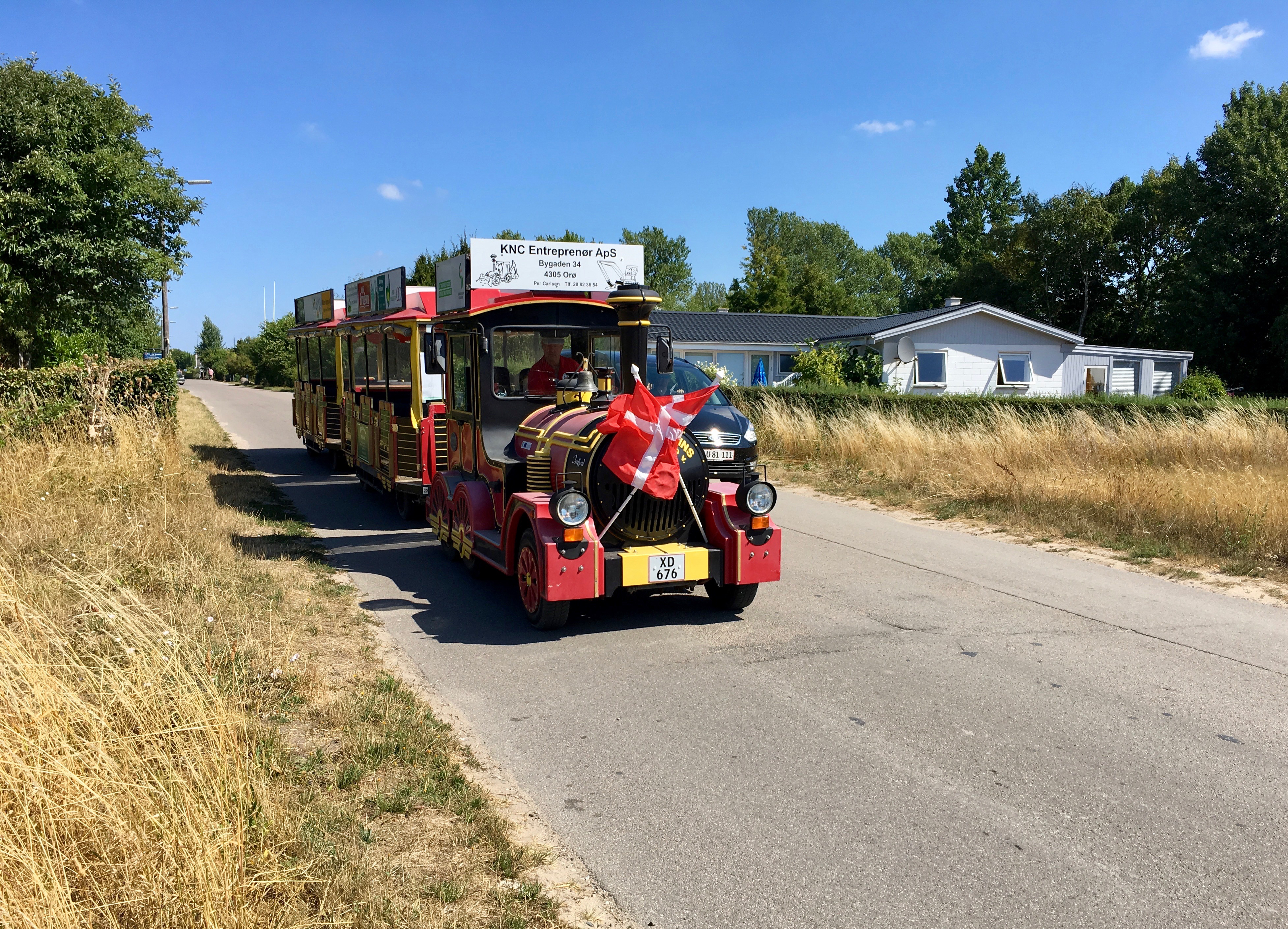 Orø-Toget, Orø